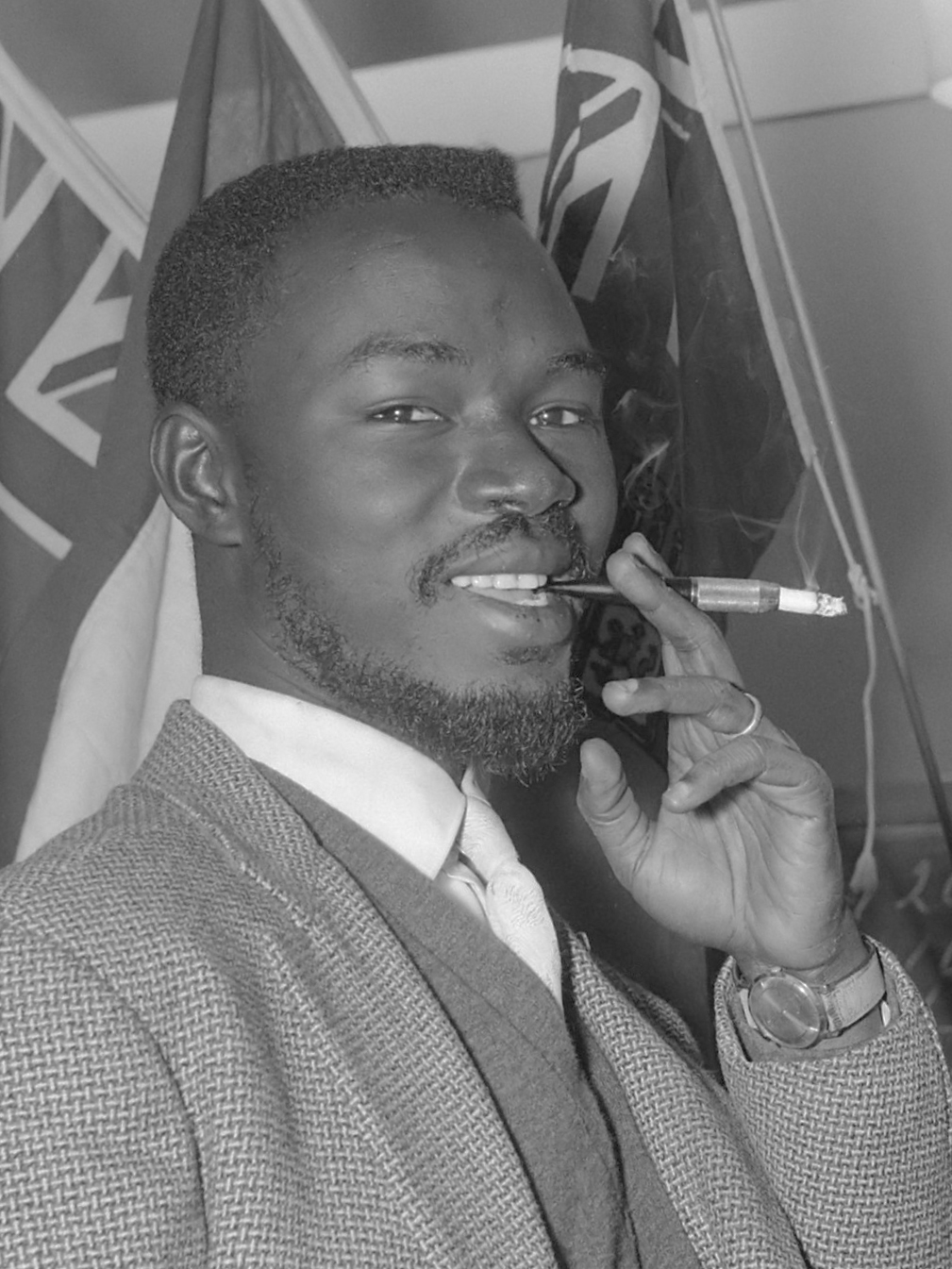 Internationaal damtoernooi in Amsterdam. Baba Sy en een meisje 2 januari 1962